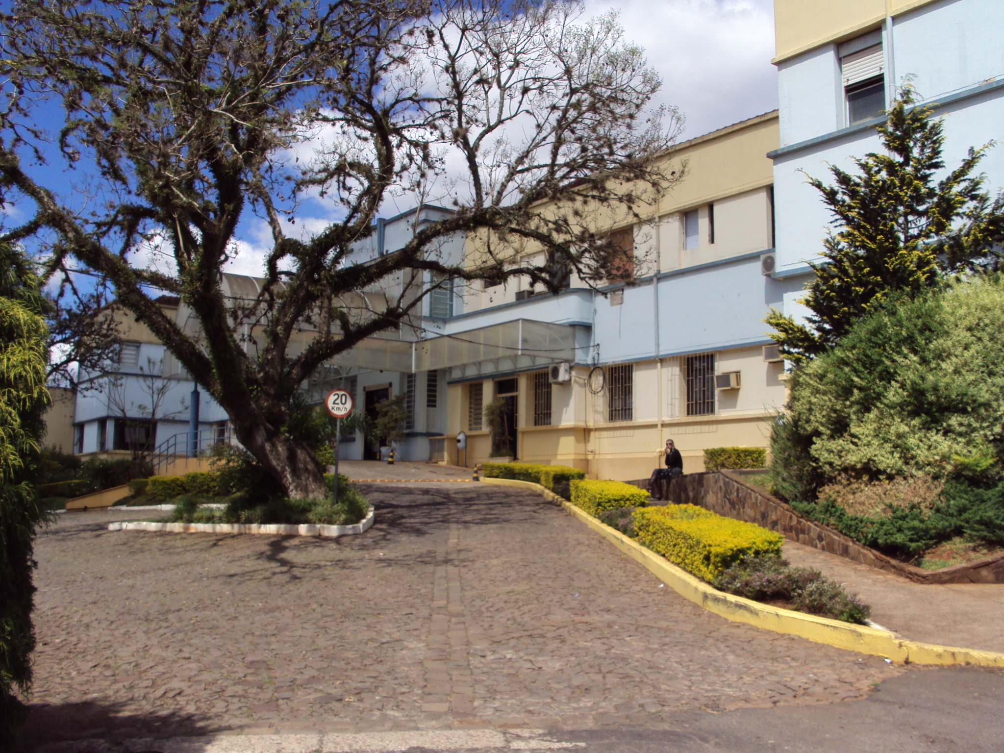 Hospital de Caridade, localizado em Erechim, Brasil.